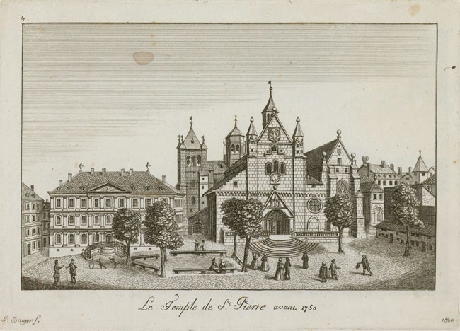 Pierre Escuyer (1749-1834), Le Temple de St Pierre avant 1750, 1820, eau-forte, 10,7 x 116,7 cm (au trait carré), 13,2 x 18,8 cm (à la cuvette), 20,5 x 29 cm (à la feuille), Atlas pittoresque de Genève, ou collection des vues les plus intéressantes de cette ville.